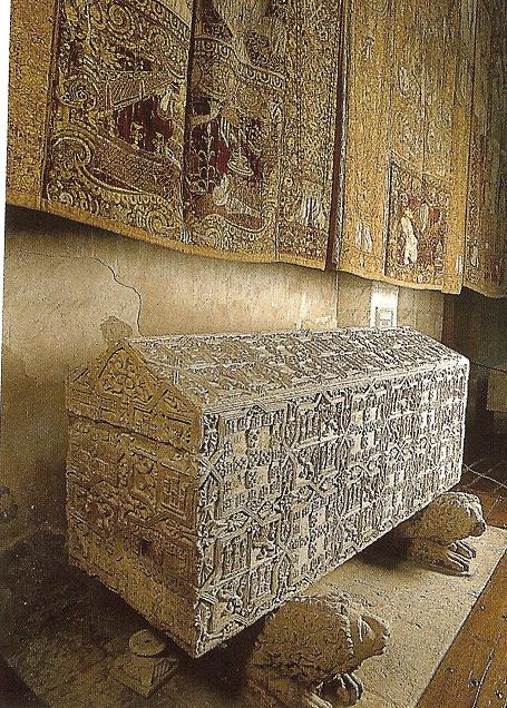 Sepulcro de la infanta Blanca de Portugal (1259-1321), que era hija del rey Alfonso III de Portugal y de la reina Beatriz de Castilla y nieta de Alfonso X el Sabio. (Monasterio de las Huelgas de Burgos).